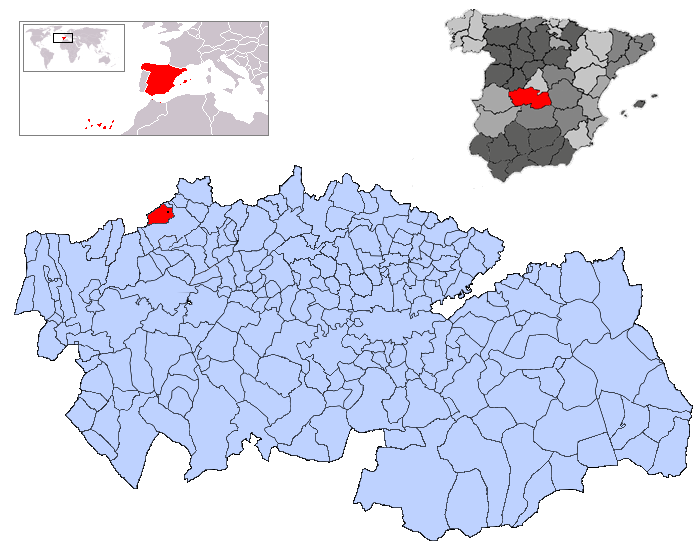 Buenaventura en la provincia de Toledo